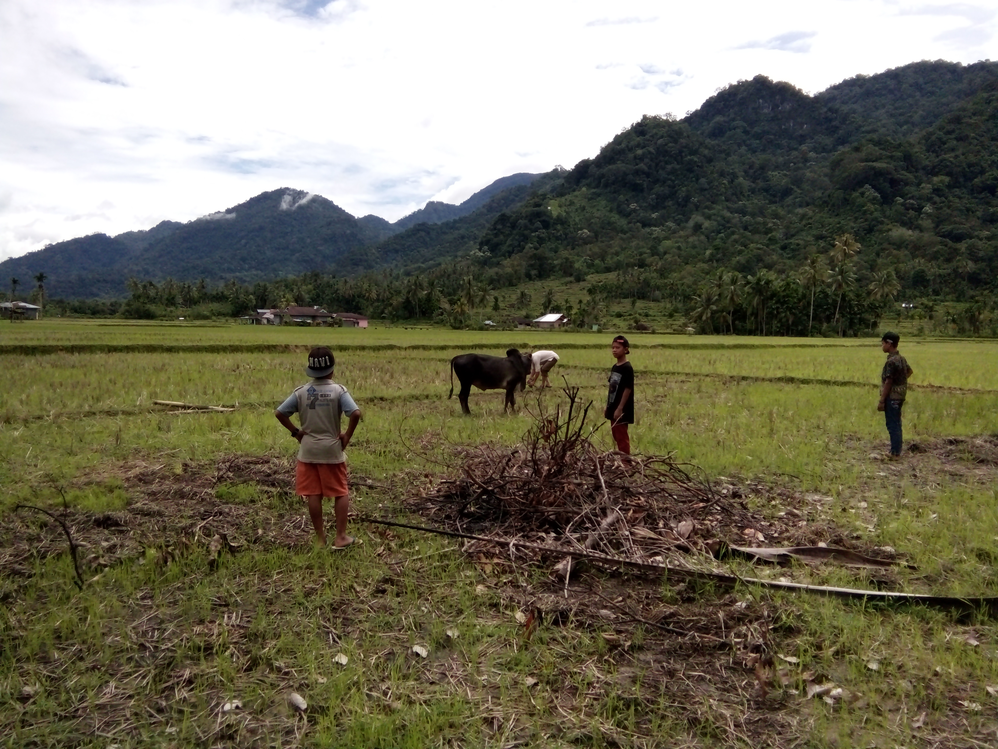 Alam Nagari Barung-Barung Balantai Selatan